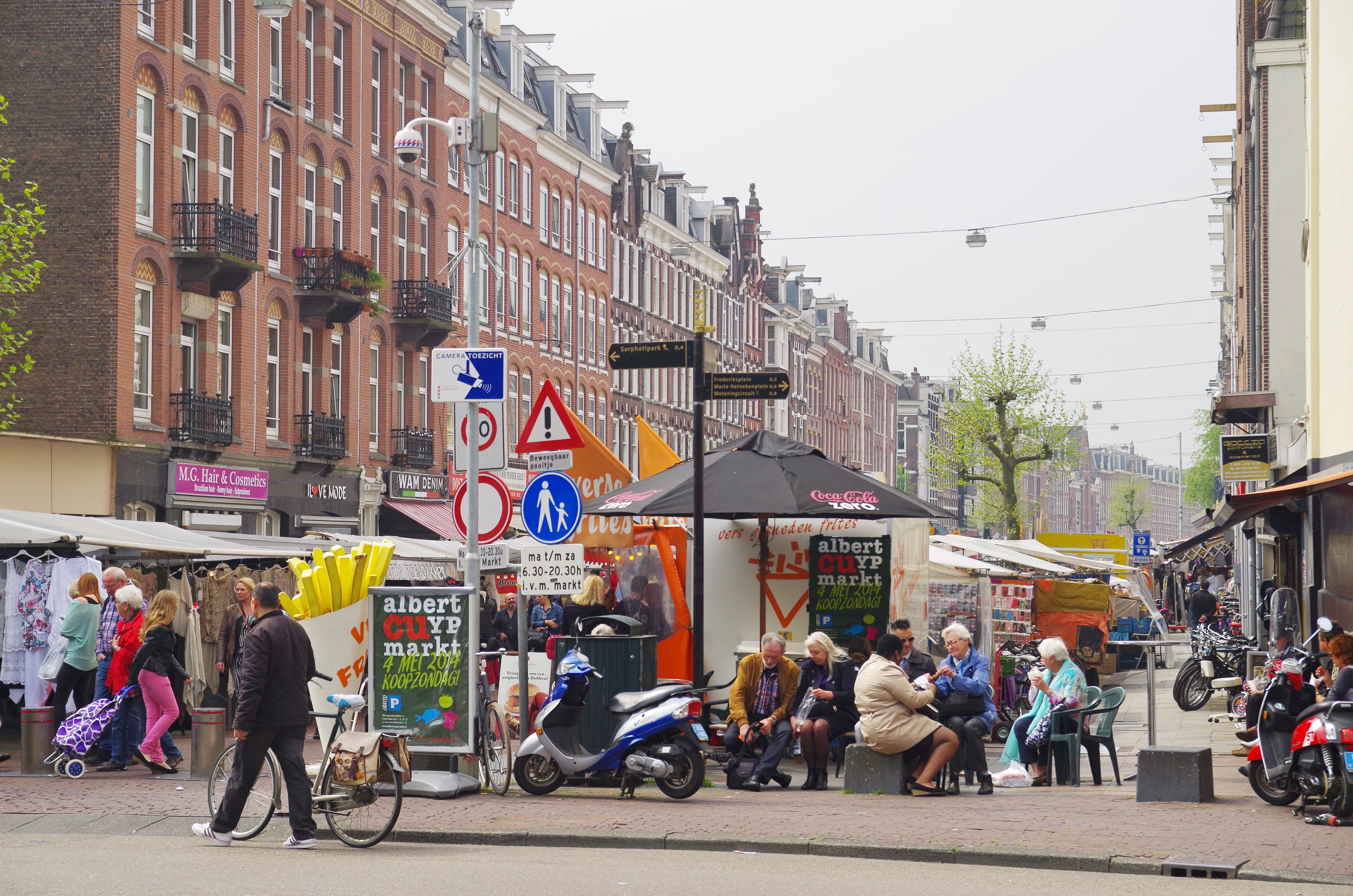 Albert Cuyp Markt, de Pijp, Amsterdam